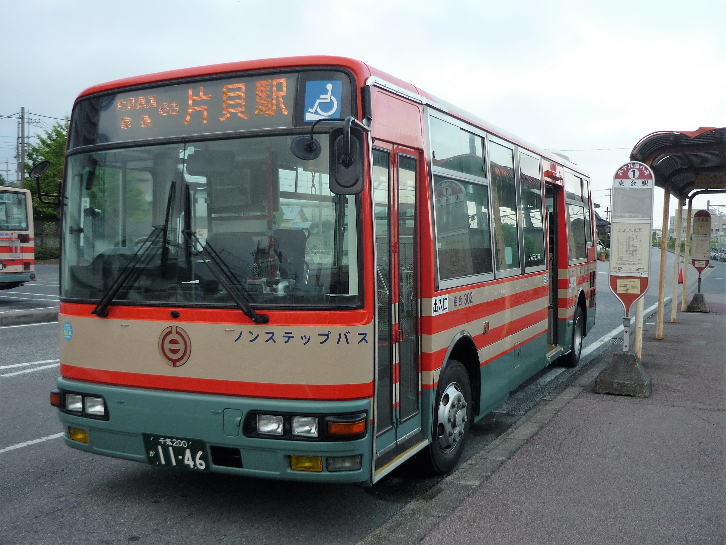 東金駅前に停車中の九十九里鉄道バス Panasonic Lumix DMC-FS3